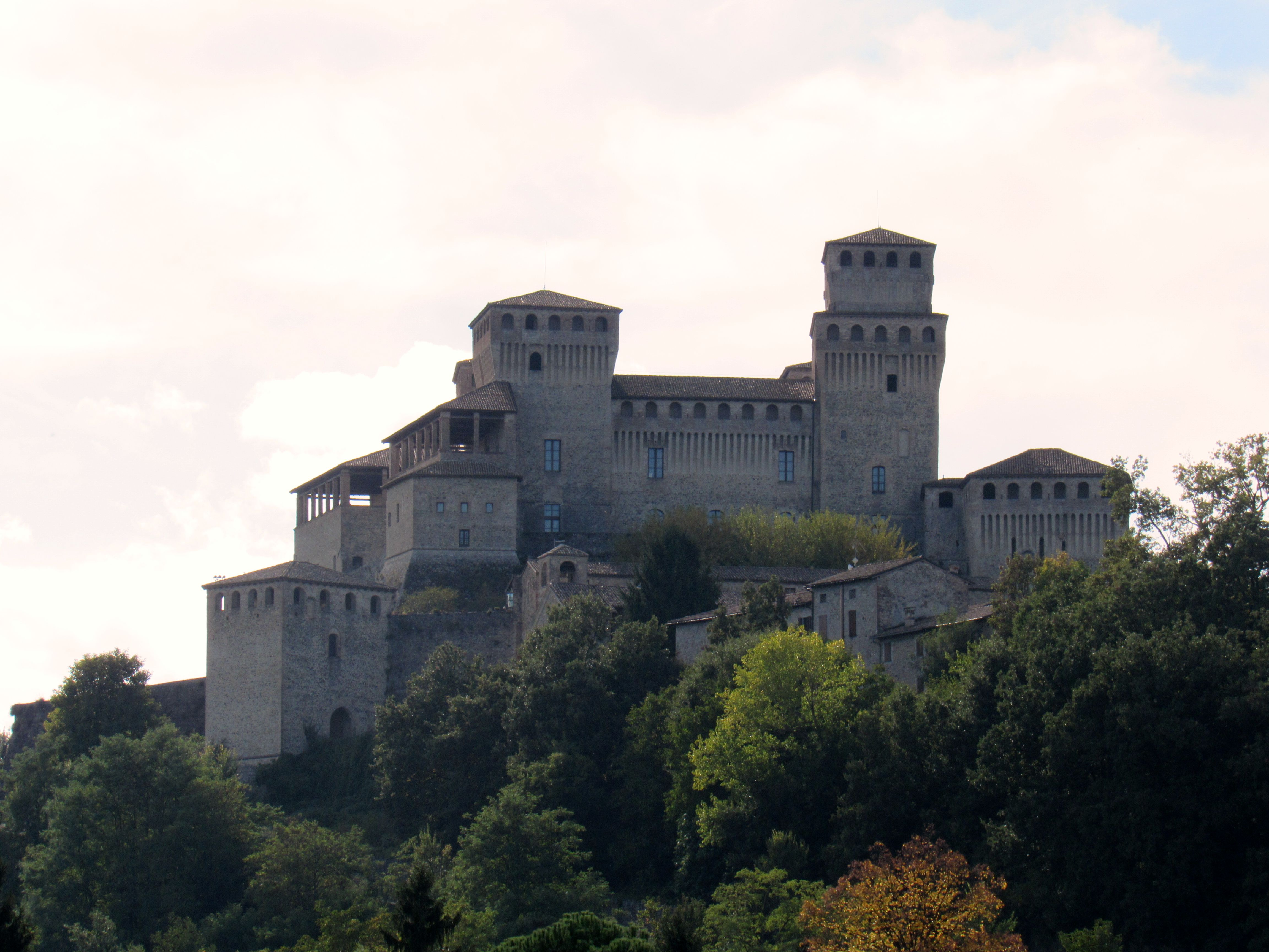 Castello di Torrechiara This is a photo of a monument which is part of cultural heritage of Italy.